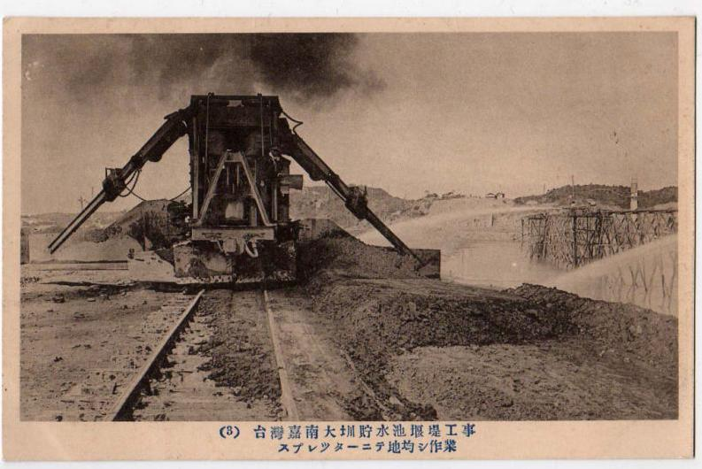 台灣嘉南大圳貯水池堰堤工事